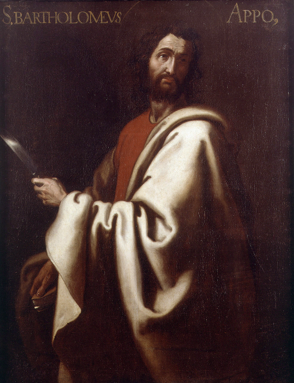 San Bartolomé apóstol